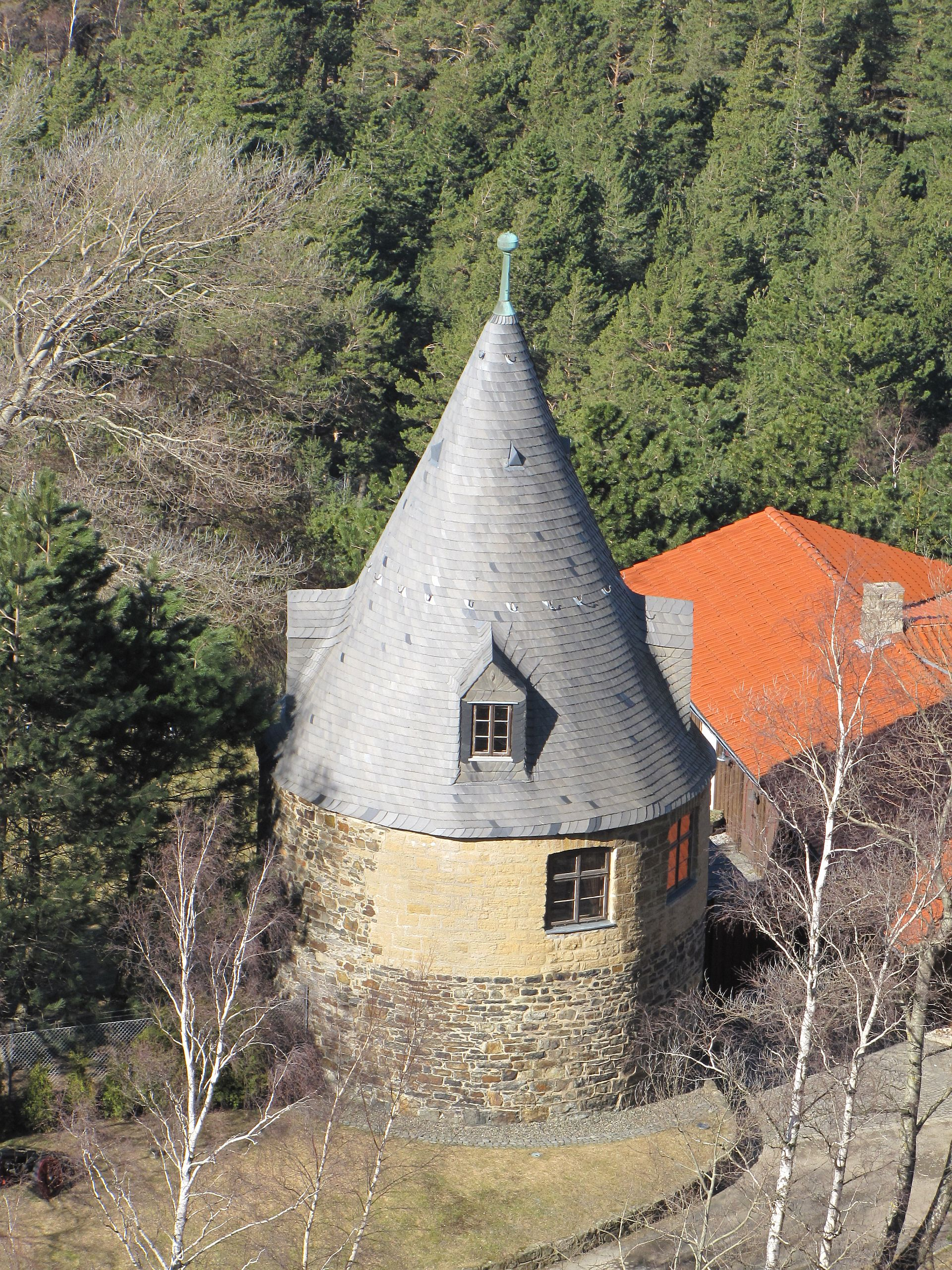 Der Maltermeisterturm am Bergwerk Rammelsberg von oben gesehen.